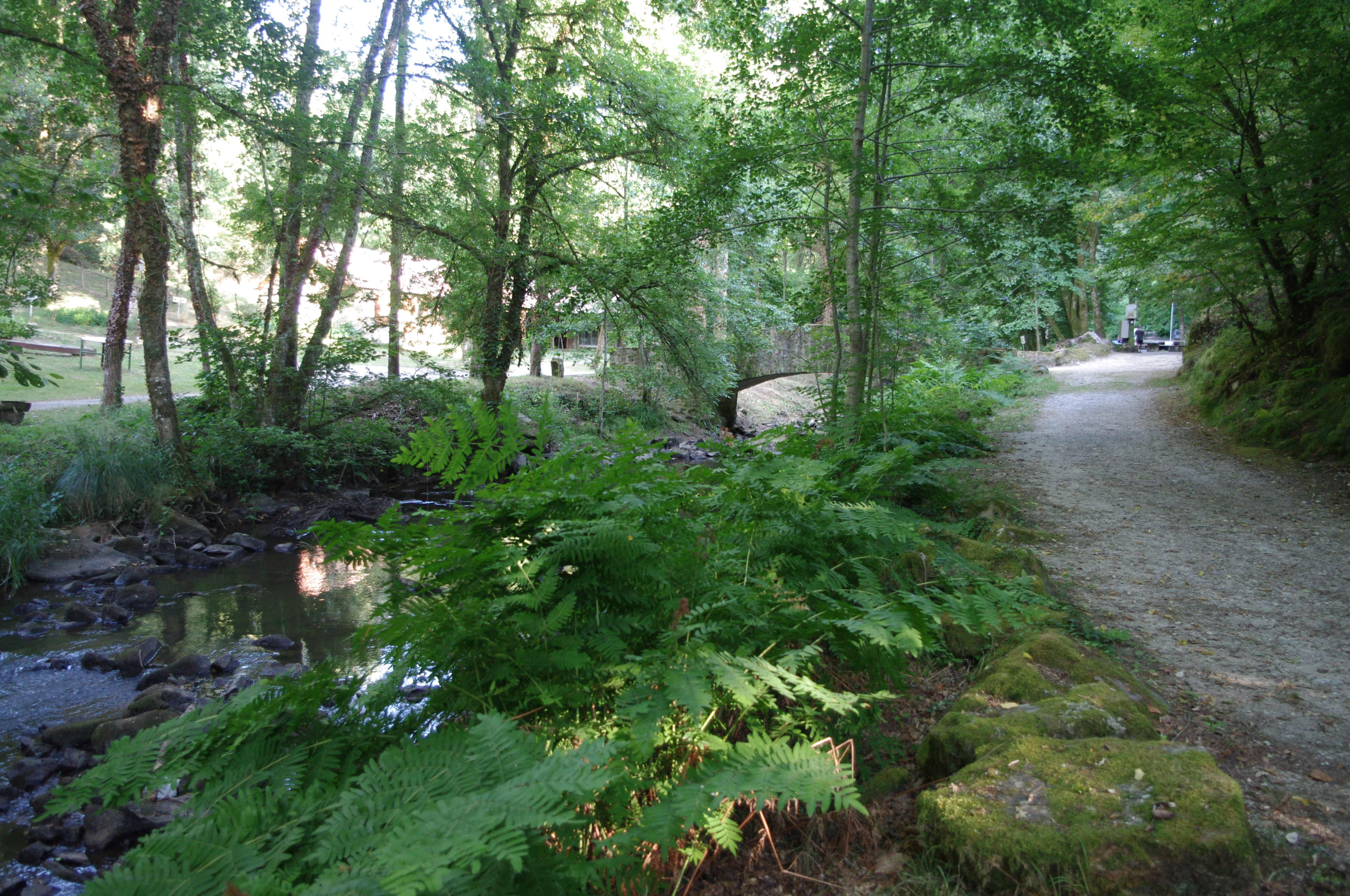 La rivière Gorre au milieu du sanctuaire Notre Dame de la Paix, Saint Auvent, Haute Vienne.